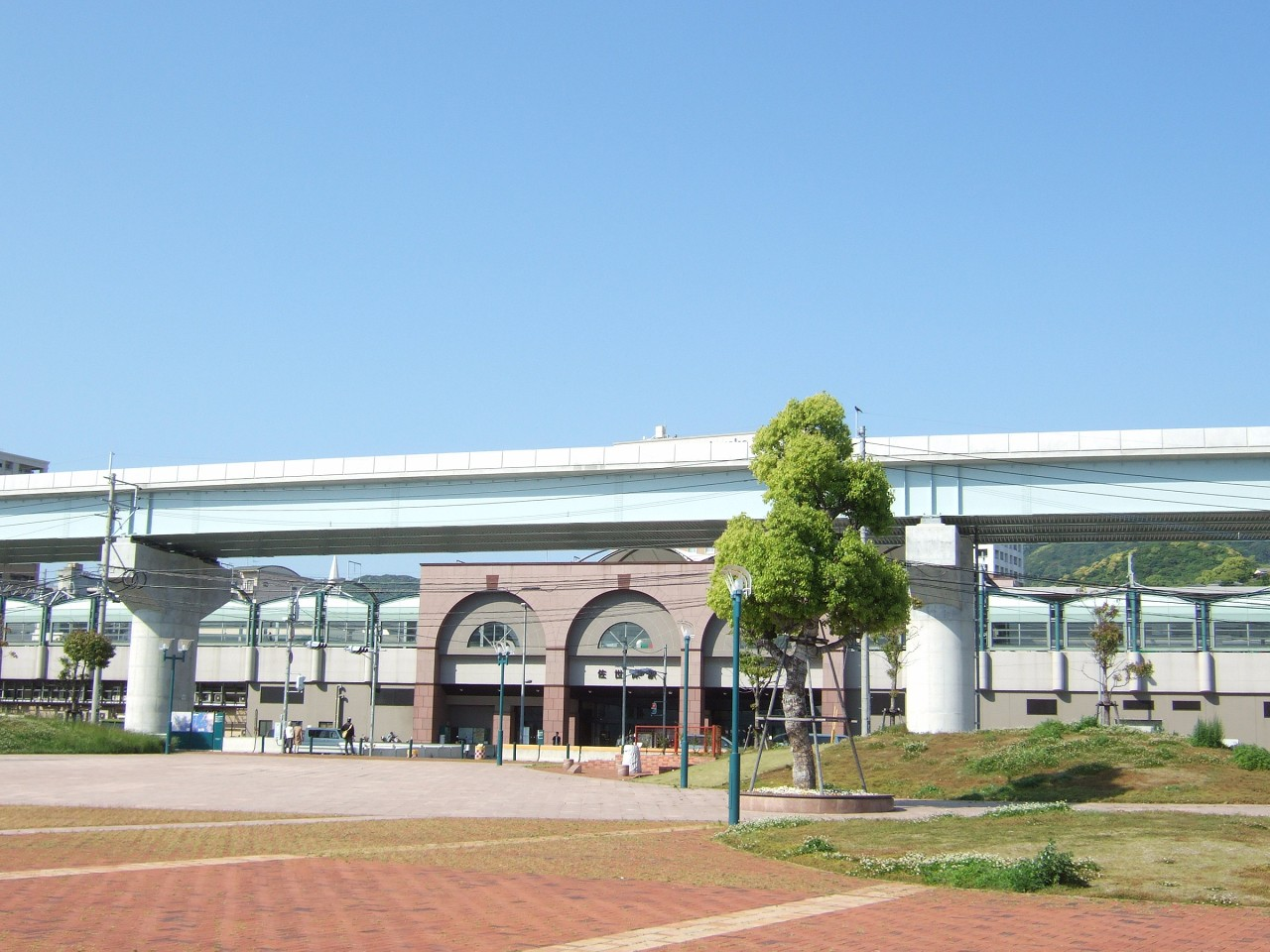 JR佐世保駅みなと口をシーサイドパーク内より遠望。手前の高架橋は西九州自動車道佐世保道路（建設中）。